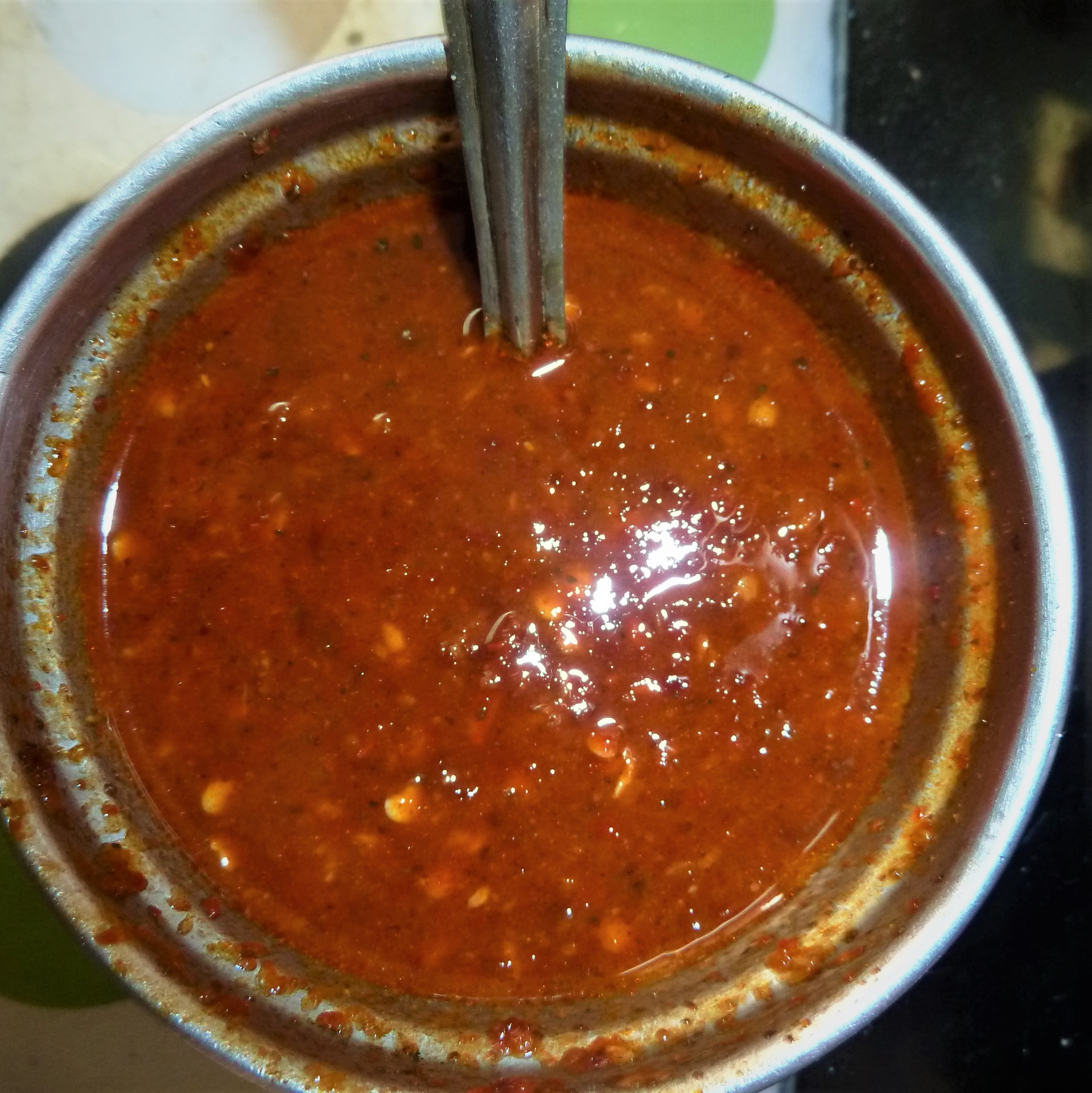 అల్లం చట్నీ